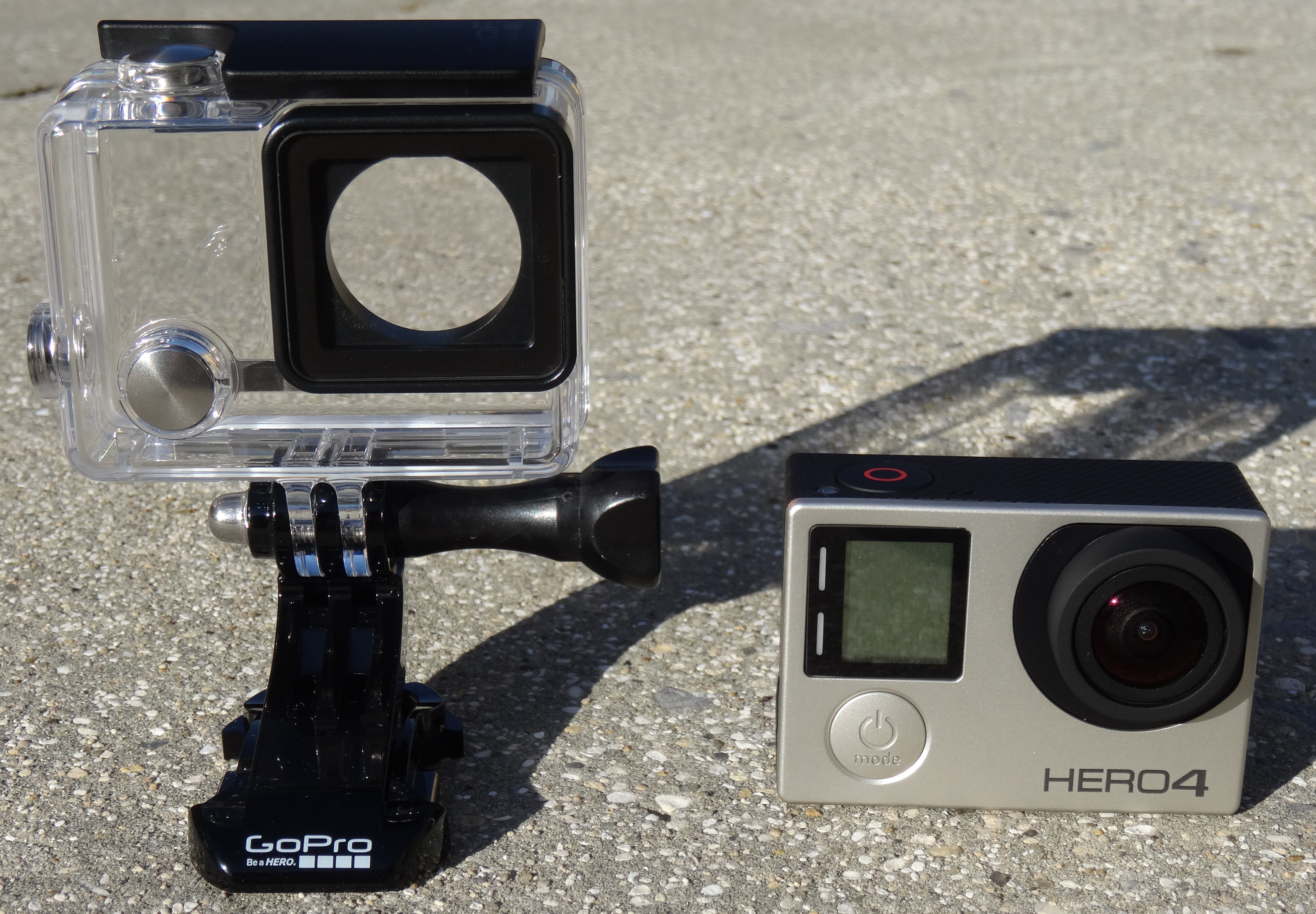 Cyclisme & GoPro : GoPro Hero 4 et accessoires.